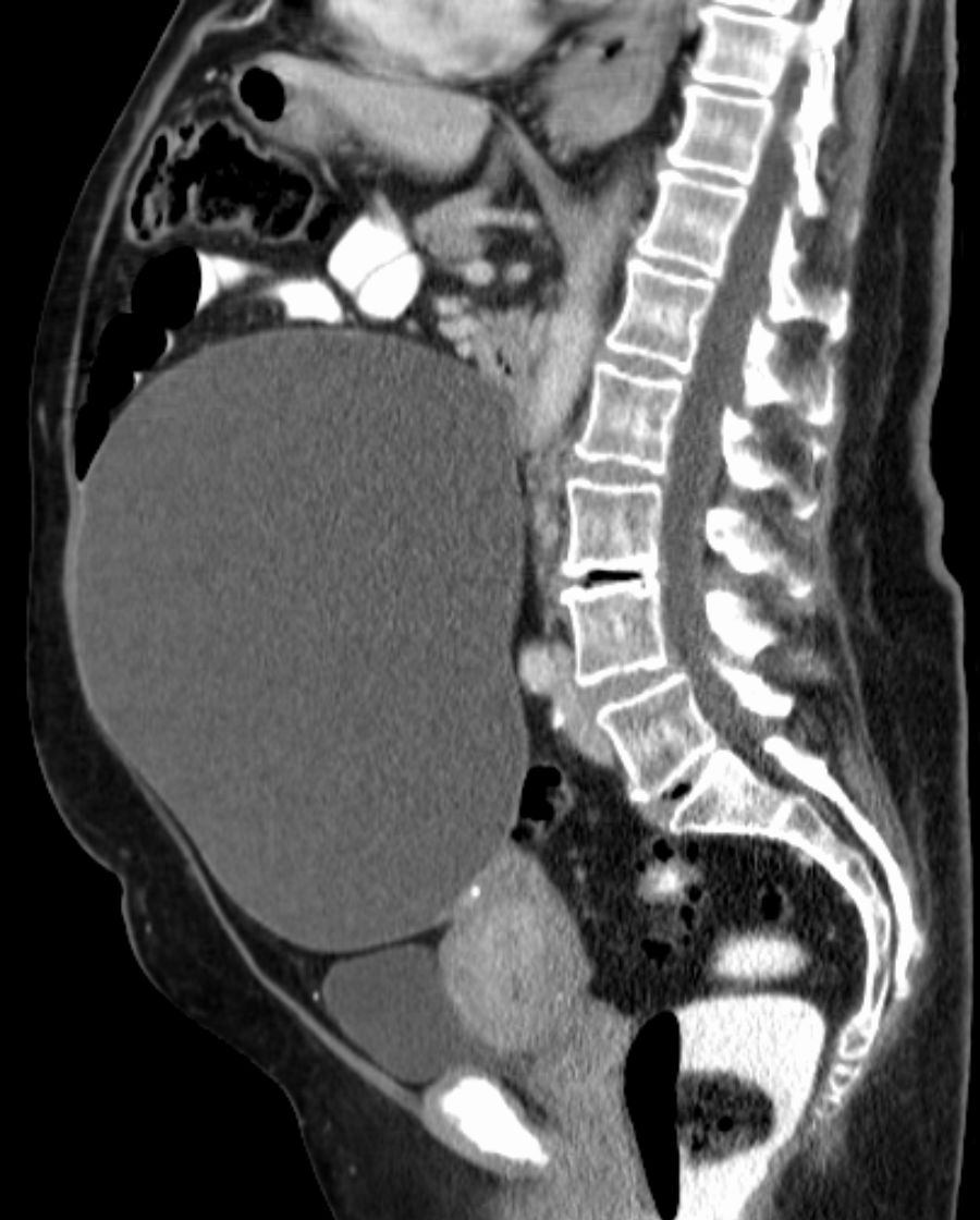 Muzinöses Zystadenom des Ovars. Computertomographie.